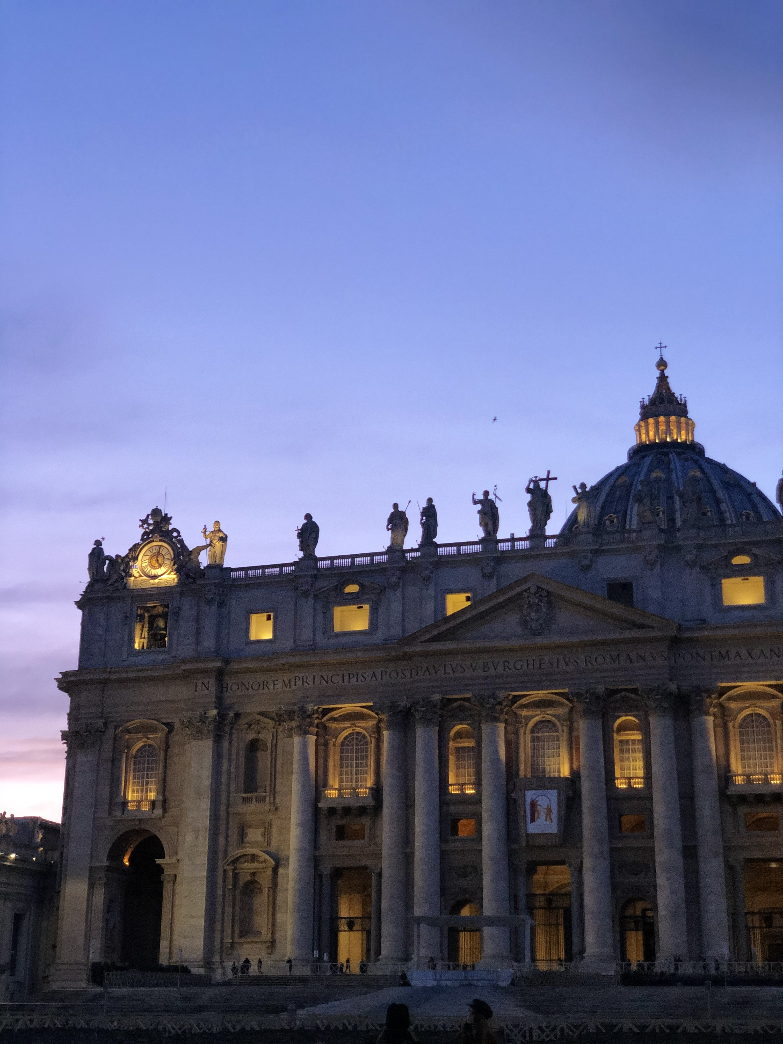 Aziz Petrus Bazilikası